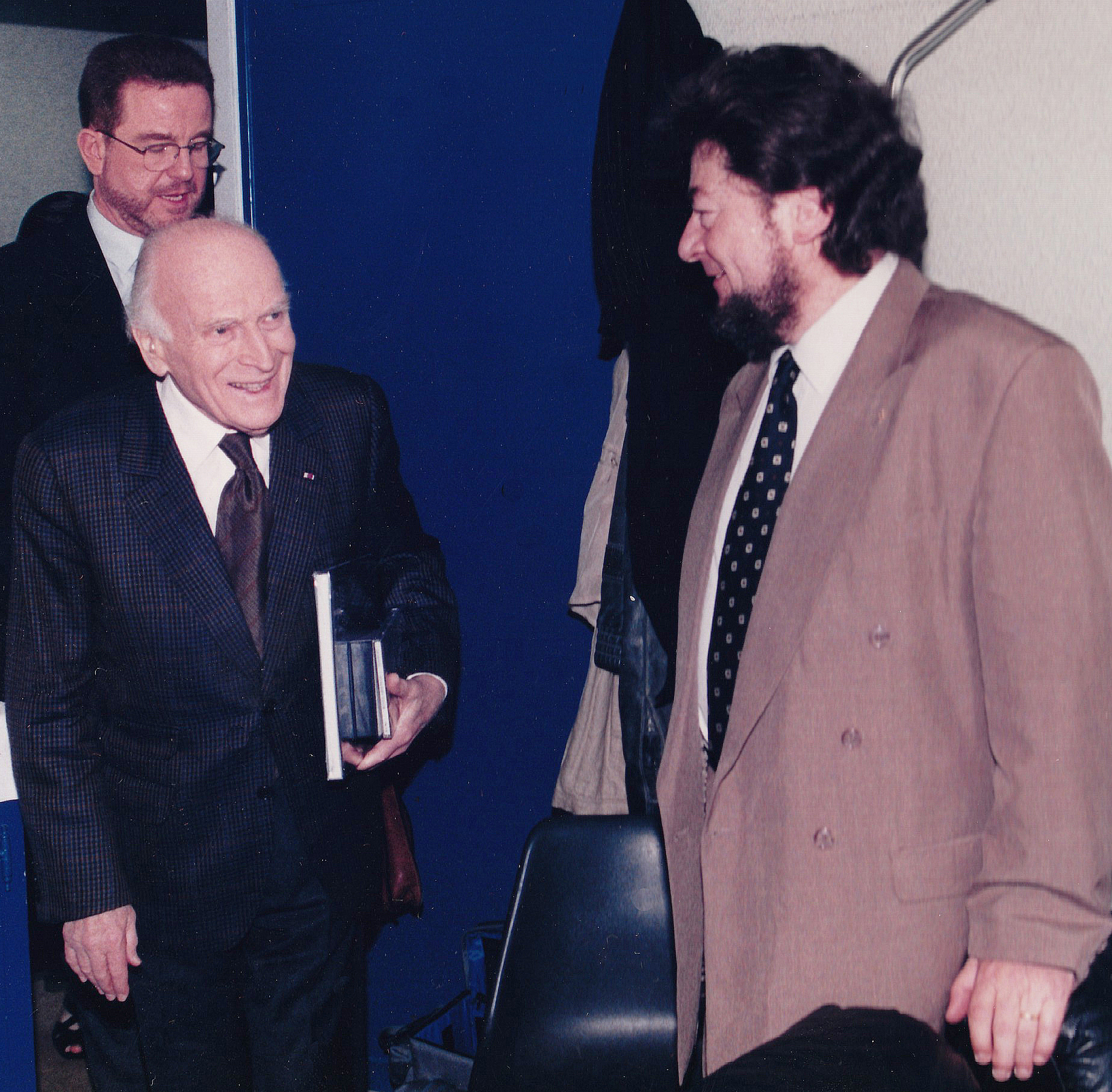 Edmond Blattchen invite Emmanuel Koch à rencontrer Yéhudi Ménuhin